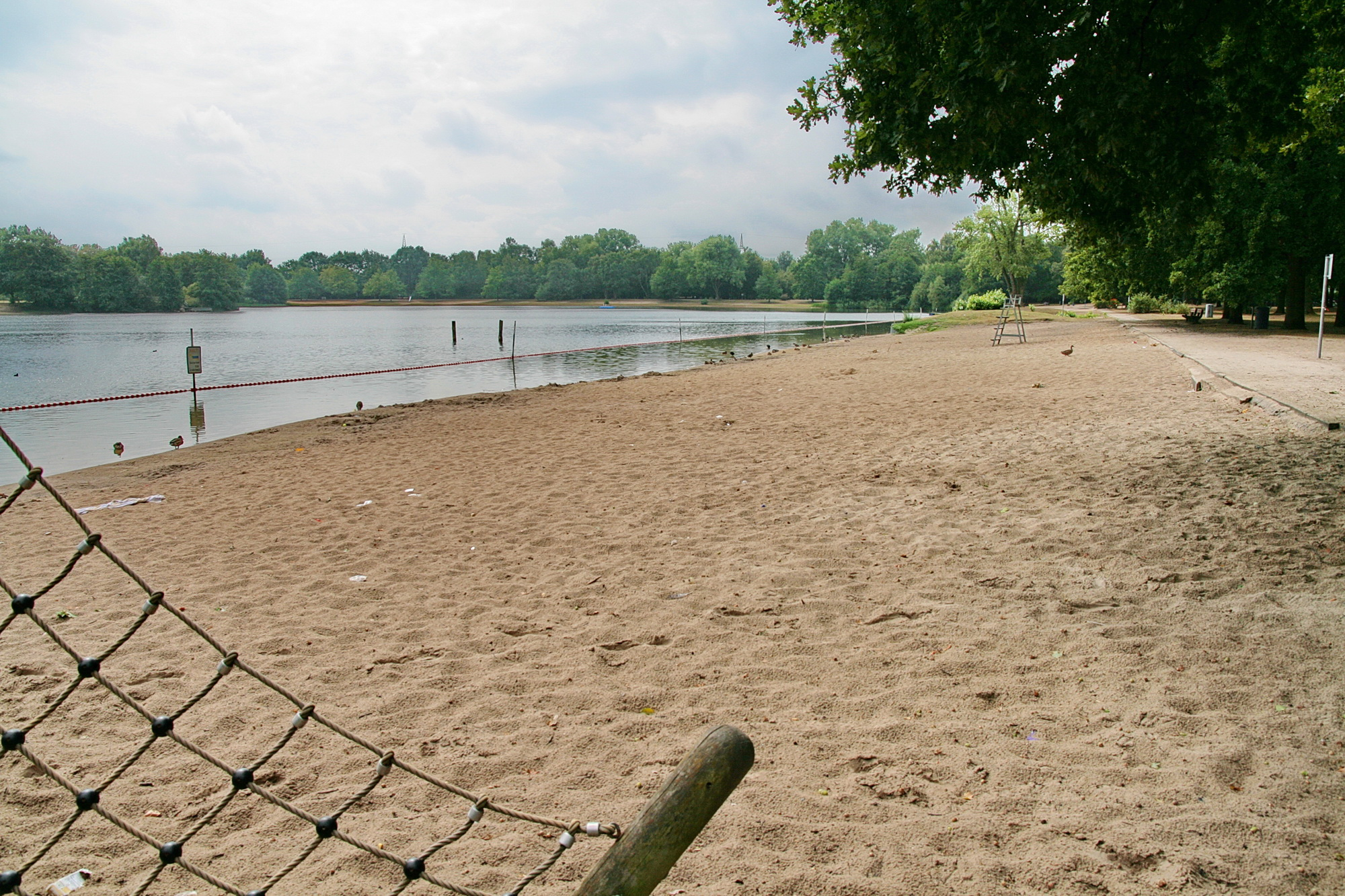 Badestrand am Silbersee in Langenhagen, Niedersachsen, Deutschland